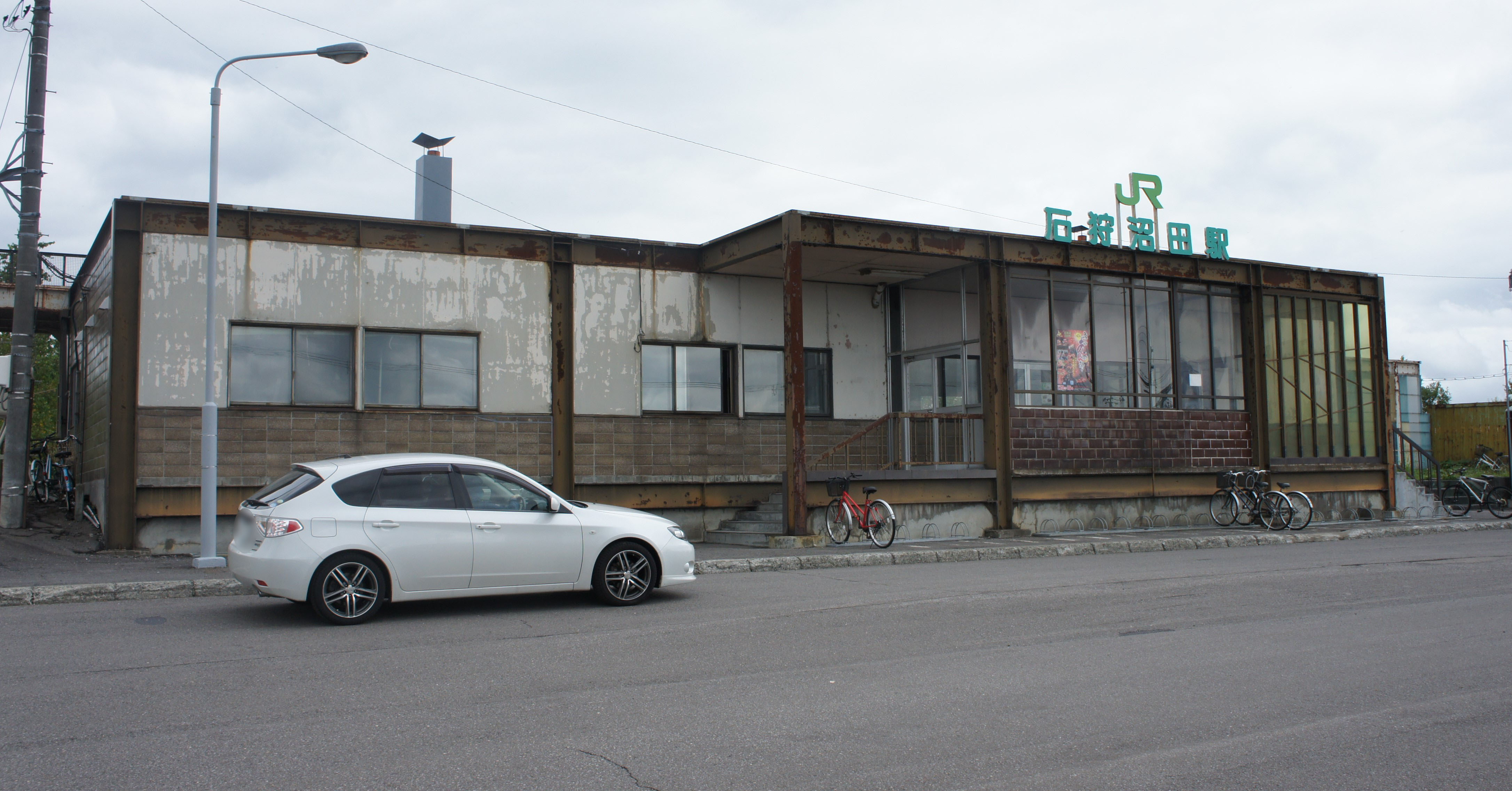 JR留萌本線・石狩沼田駅の駅舎